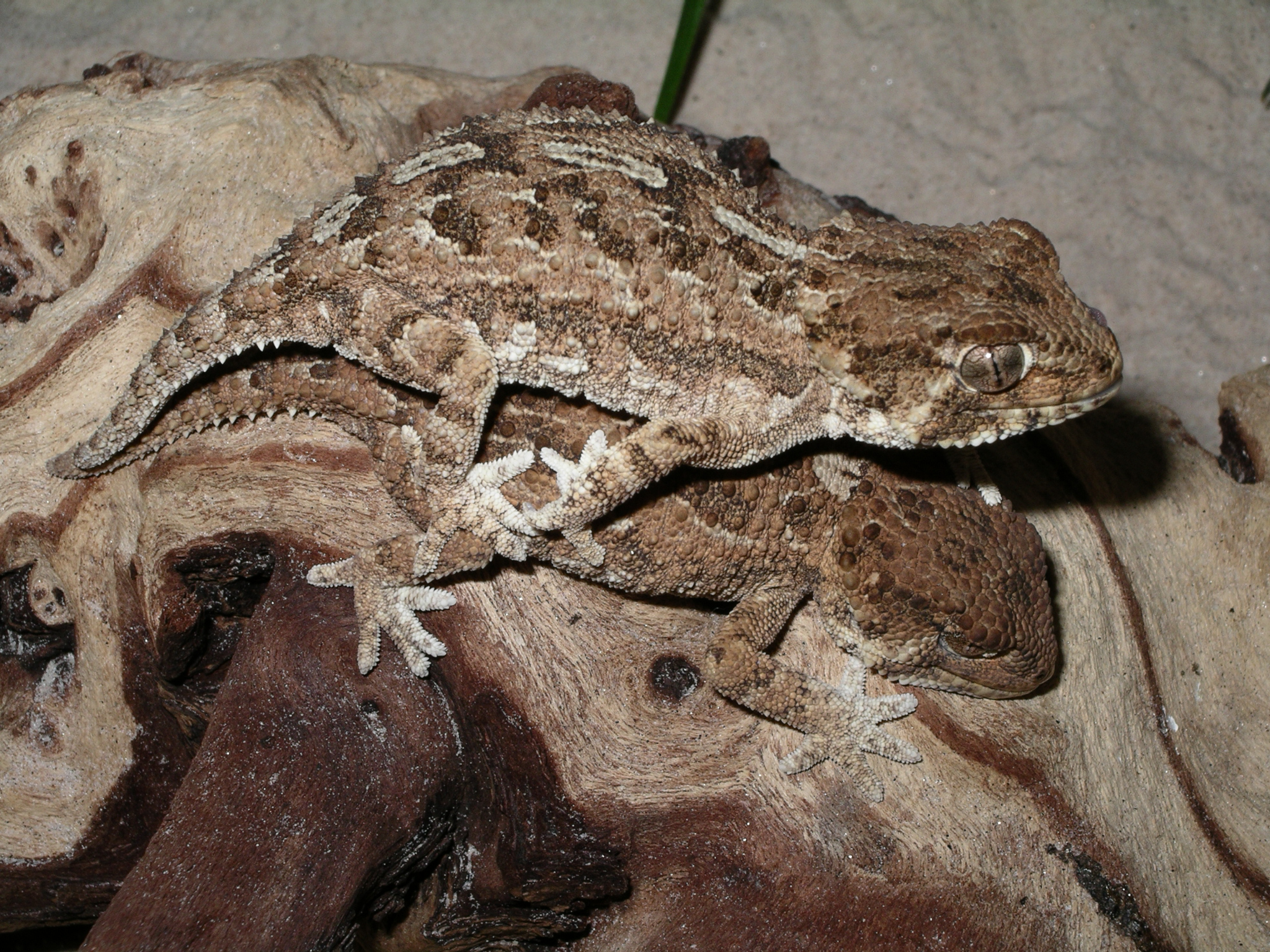 Hjälmgecko - Tarentola chazaliae